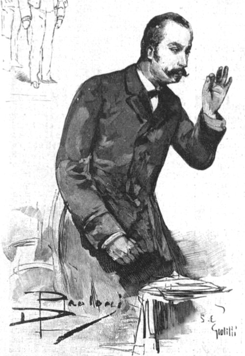 Giolitti alla Camera